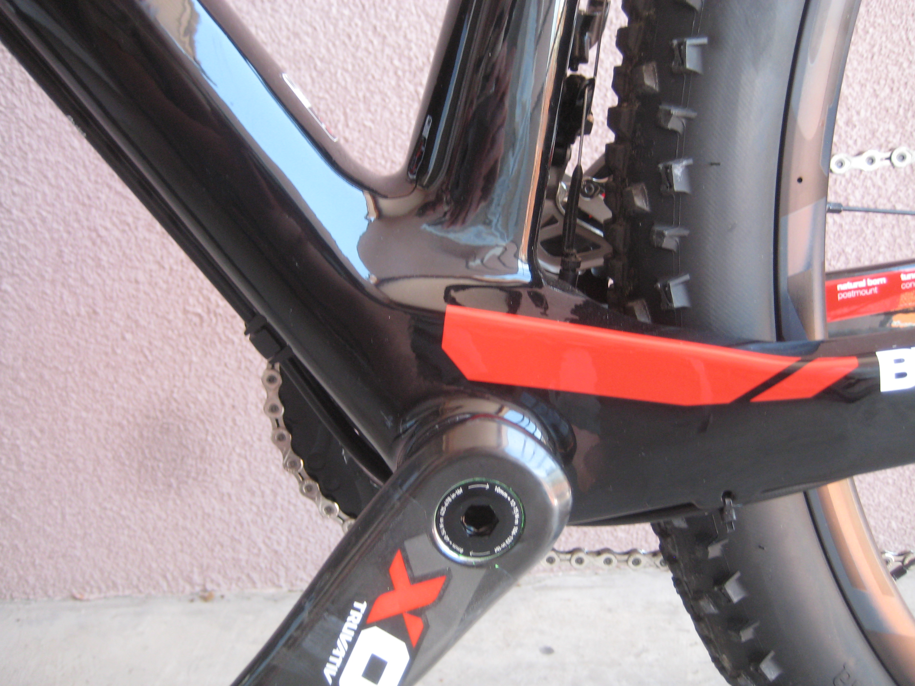 2013 cross-country hardtail mountain bike Team Elite 01 29 by Swiss constructor BMC: oversized bottom bracket